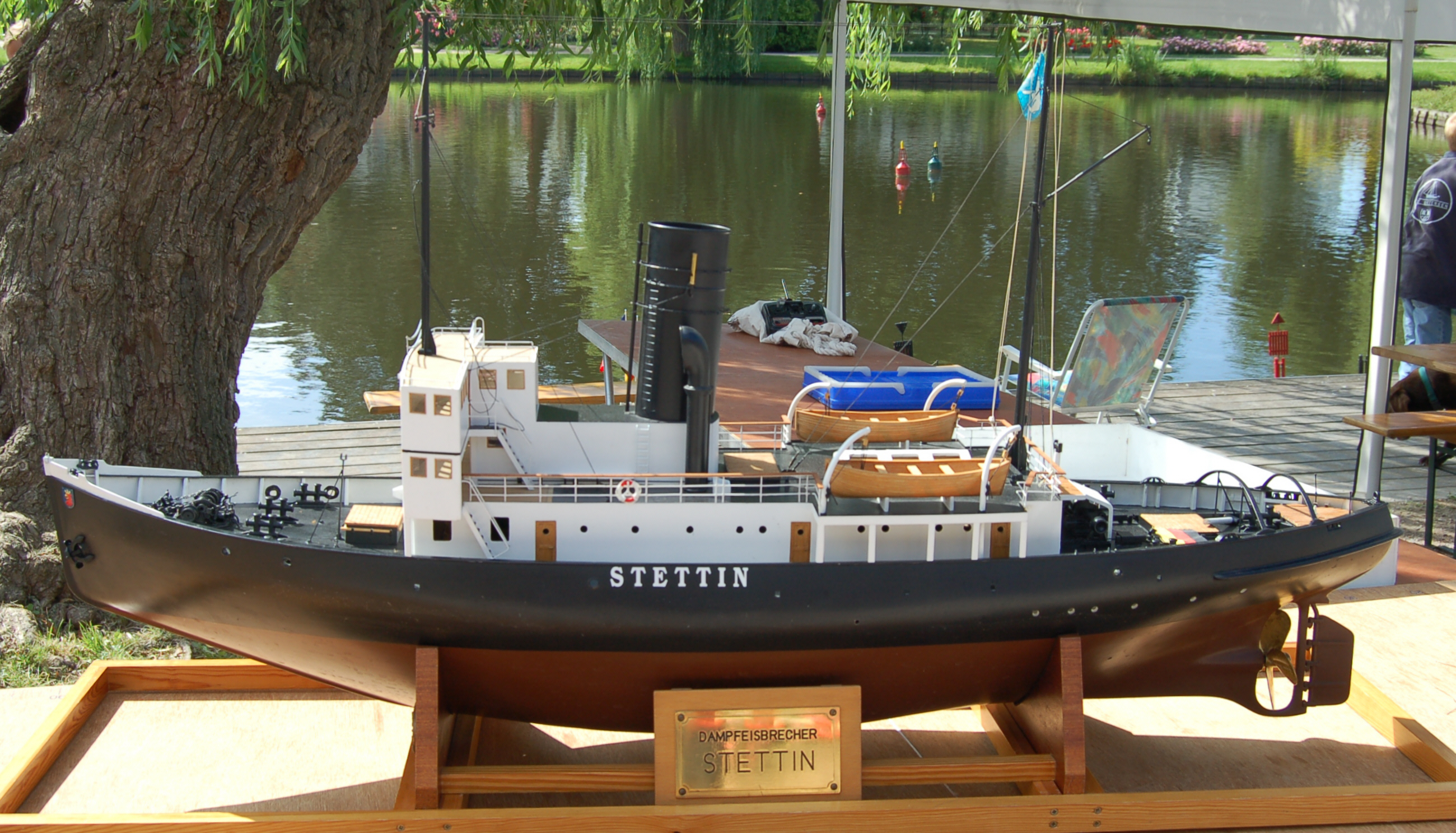 Modell des Dampfeisbrecher "Stettin" beim Schaufahren im Rosarium Uetersen anlässlich der 775-Jahr-Feier der Stadt.